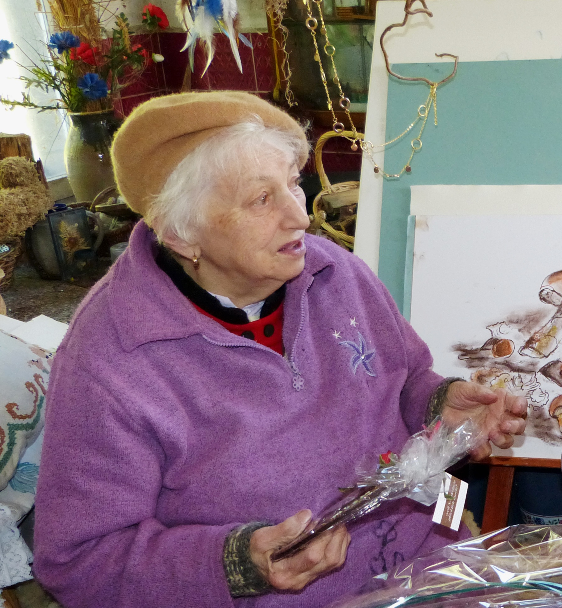 Malerin Irmgard Kuhlee in ihrem Haus am See in Groß Buckow